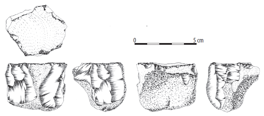 Rdzeń mezolityczny wtórnie wykorzystany jako krzesak odnaleziony na stanowisku nr 22 w Łukawicy, woj. pomorskie.